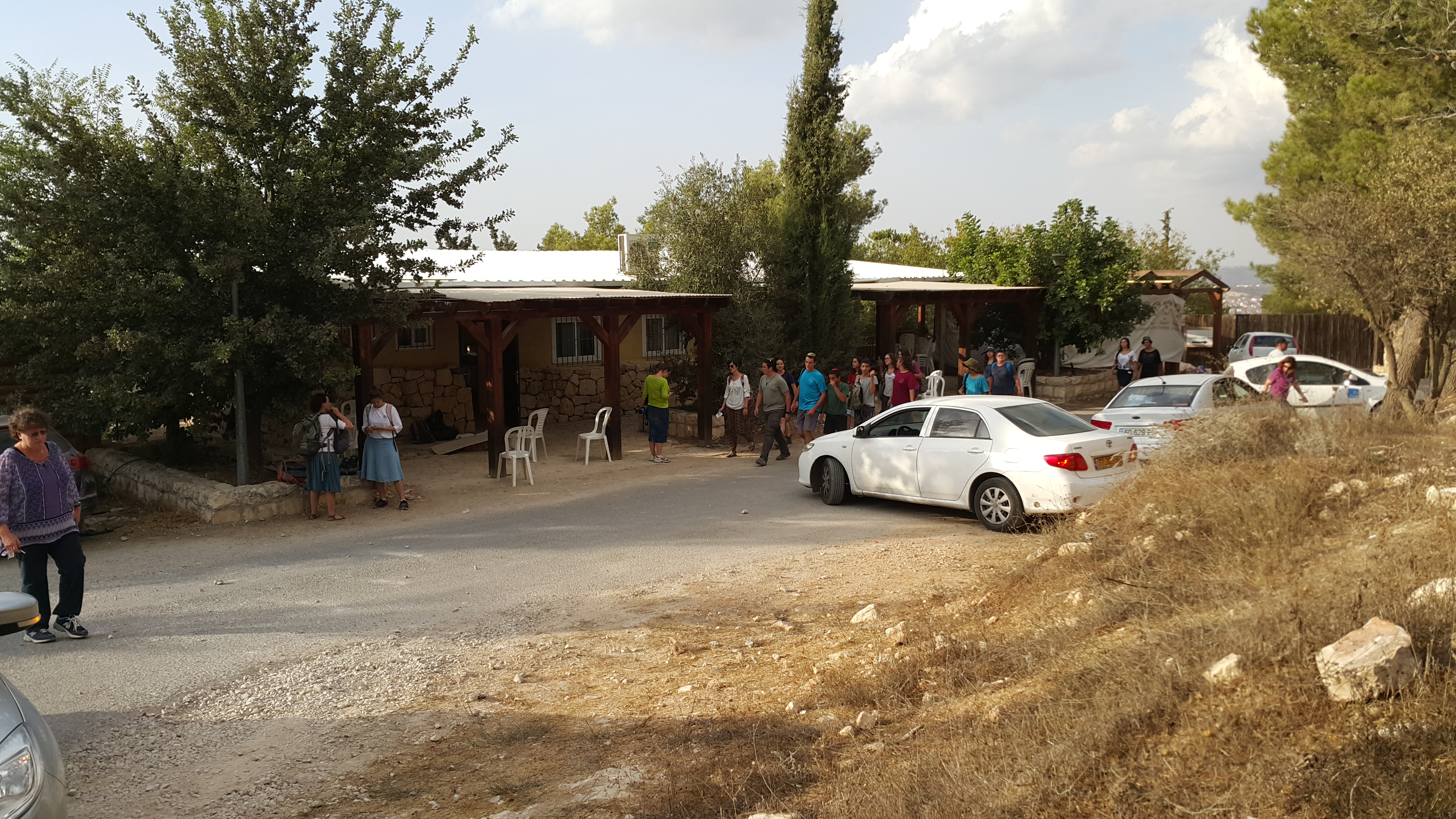 חוות משואות - משואות יצחק